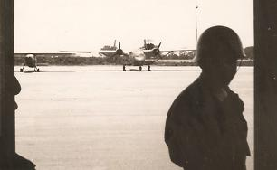 Bissalanca - Avião foi capturado à Guiné-Conakry em 27 de Março de 1968